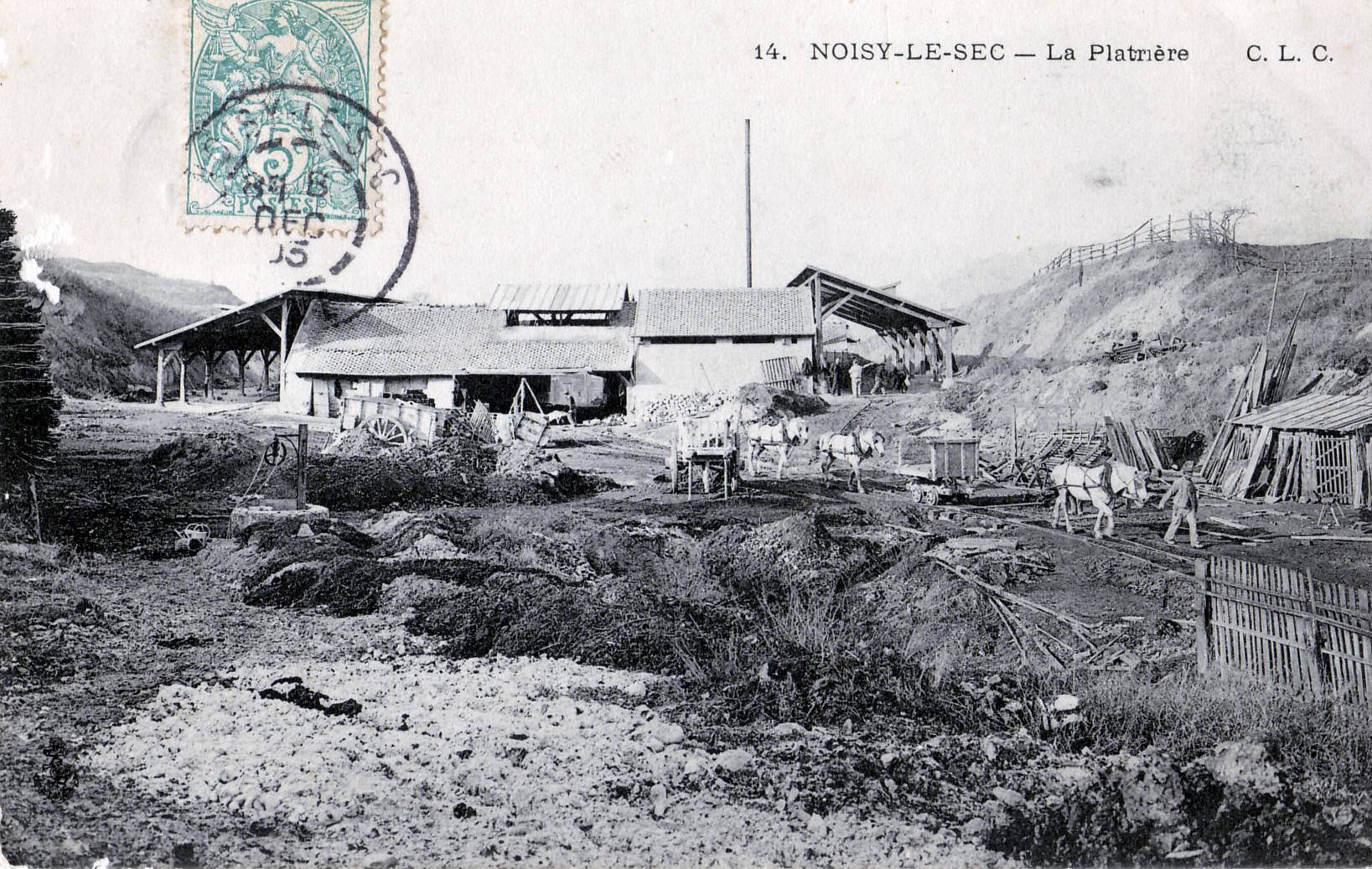 Carte postale ancienne éditée par CLC N°14 Noisy-le-Sec : La Plâtrière (On distingue des tombereaux en traction hippomobile sur voie ferrée industrielle, probablement à voie étroite système Decauville)